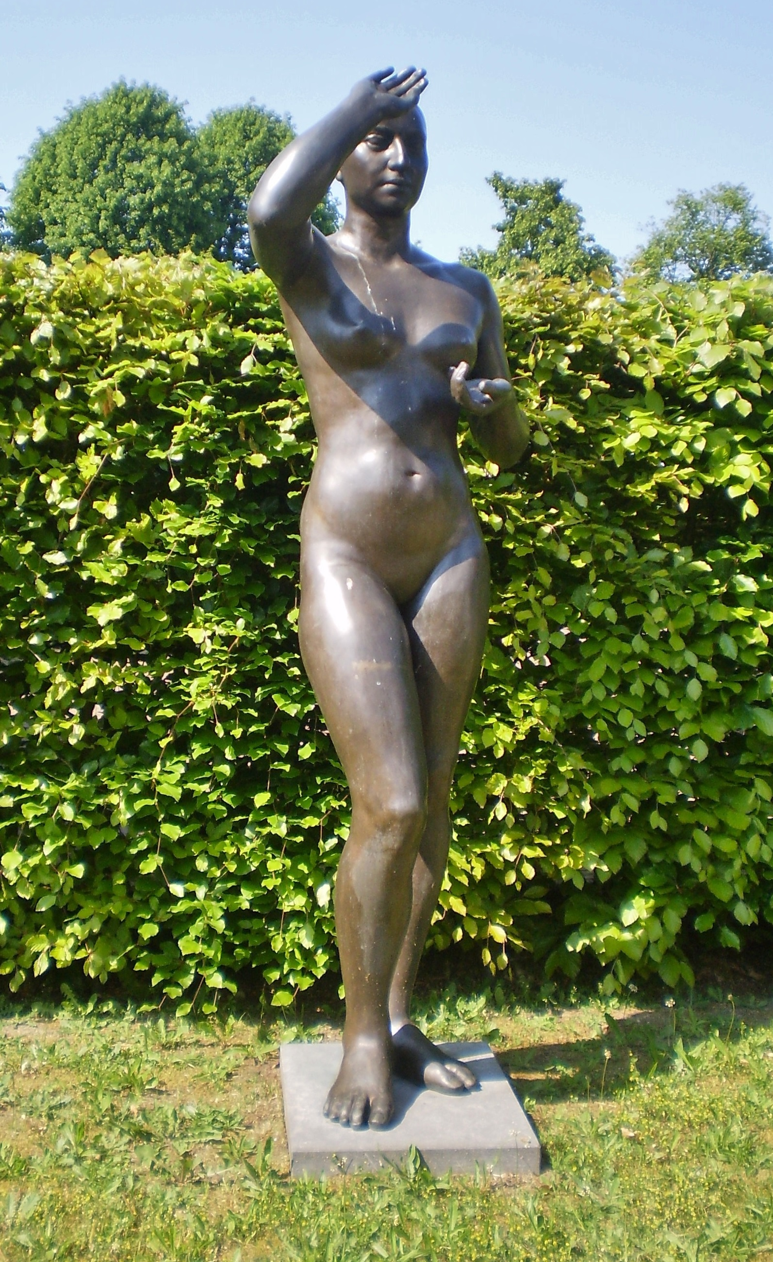 Im Auftrag der Eidgenossenschaft schuf der Schweizer Bildhauer August Suter 1937 zur Weltfachausstellung in Paris die Skulptur L' Afghane. Heute ist diese in Blaricum zu sehen.